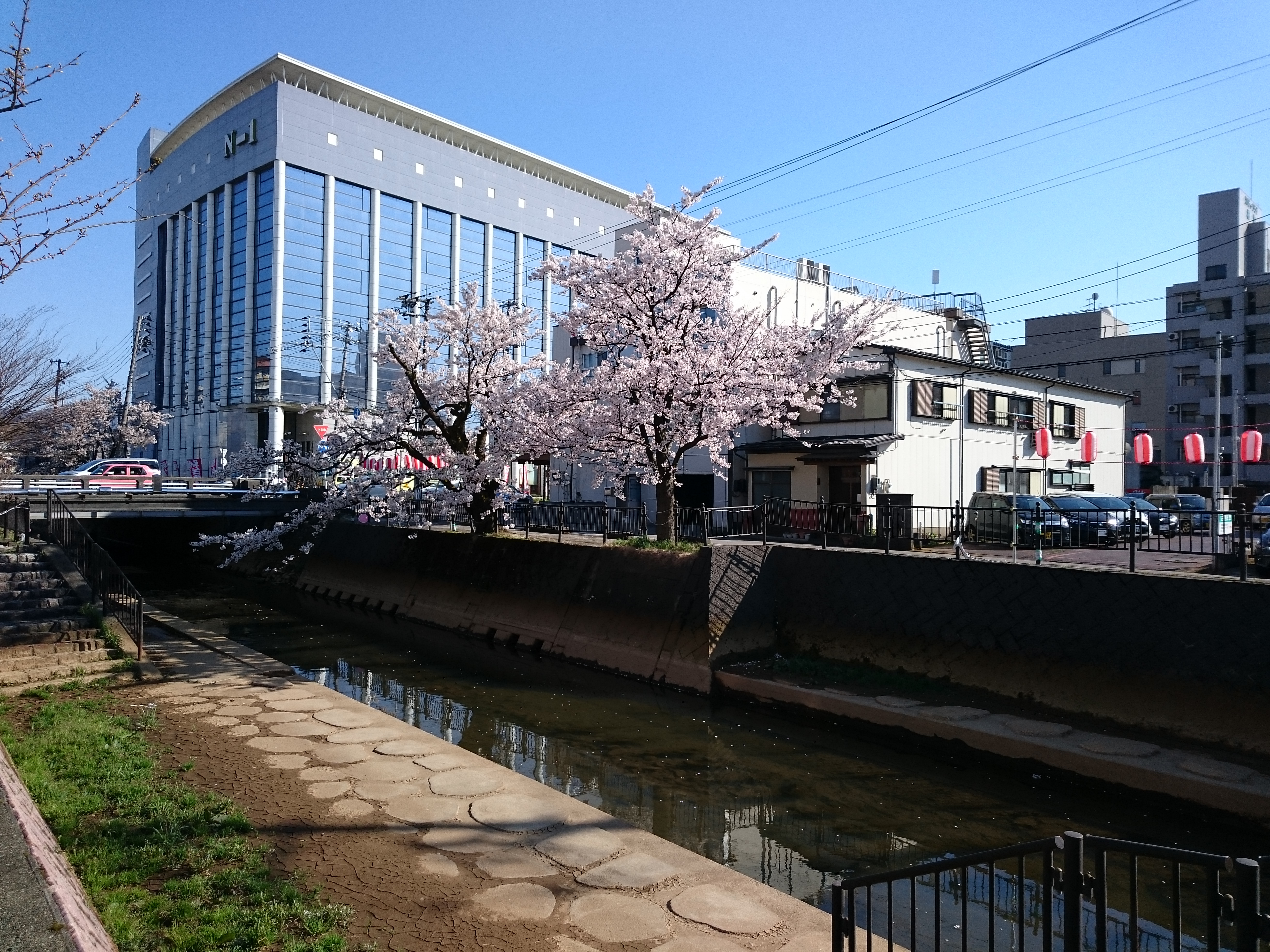 桜が見られる時期の柿川（長岡市殿町）